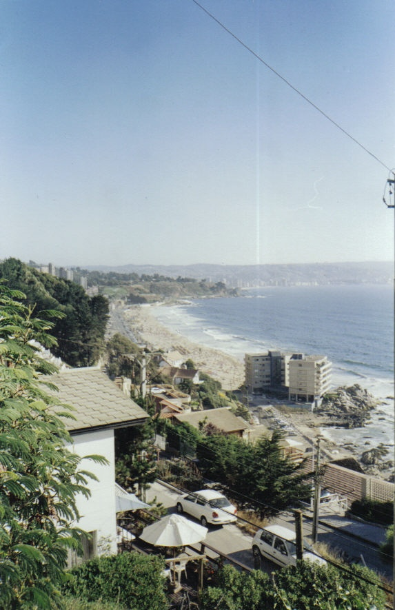 Visión panorámica de Reñaca, tomada por mí. Foto de 2005.